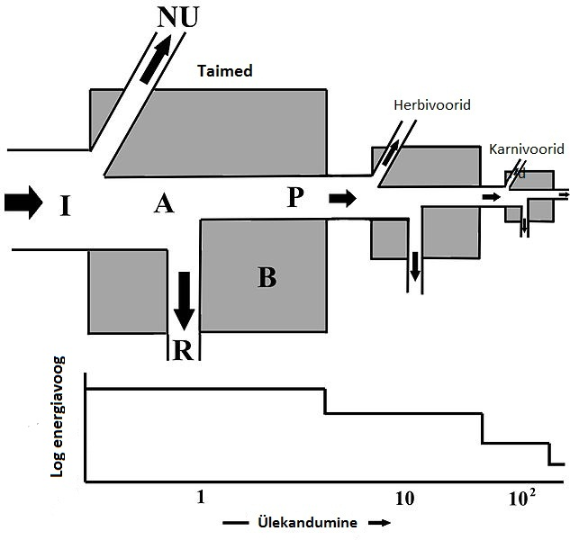 Joonis illustreerib energiavoogu toiduahelas. Tegemist on lihtsa toiduahelaga, mis koosneb taimest, herbivoorist ja karnivoorist. Näitab energiavoo ja energia muundamise suhet. Kui energia liigub toiduahelas kõrgemale troofilisele tasemele, siis muutub see ebakvaliteetsemaks, hajutatuks ja väiksemaks. I=energia sissevool, A=assimilatsioon, R=respiratsioon, NU=kasutamata energia, P=produktsioon, B= biomass